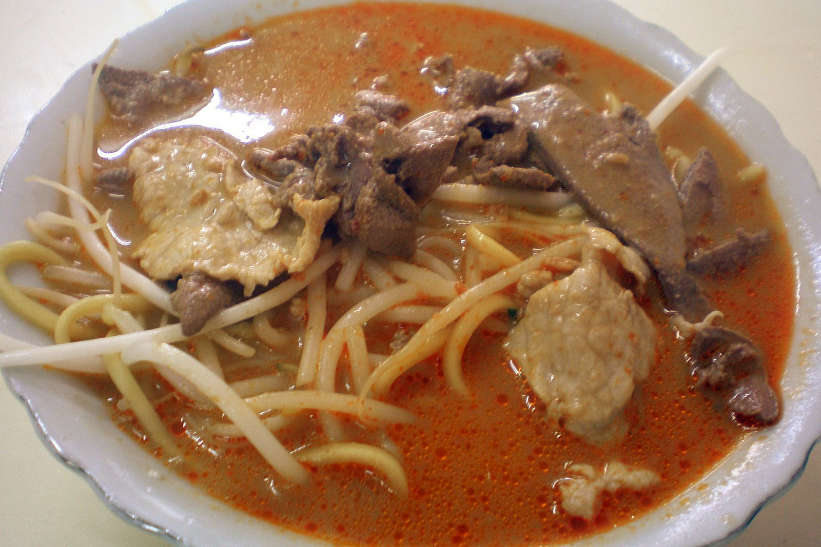 Xiamen Shacha Noodle